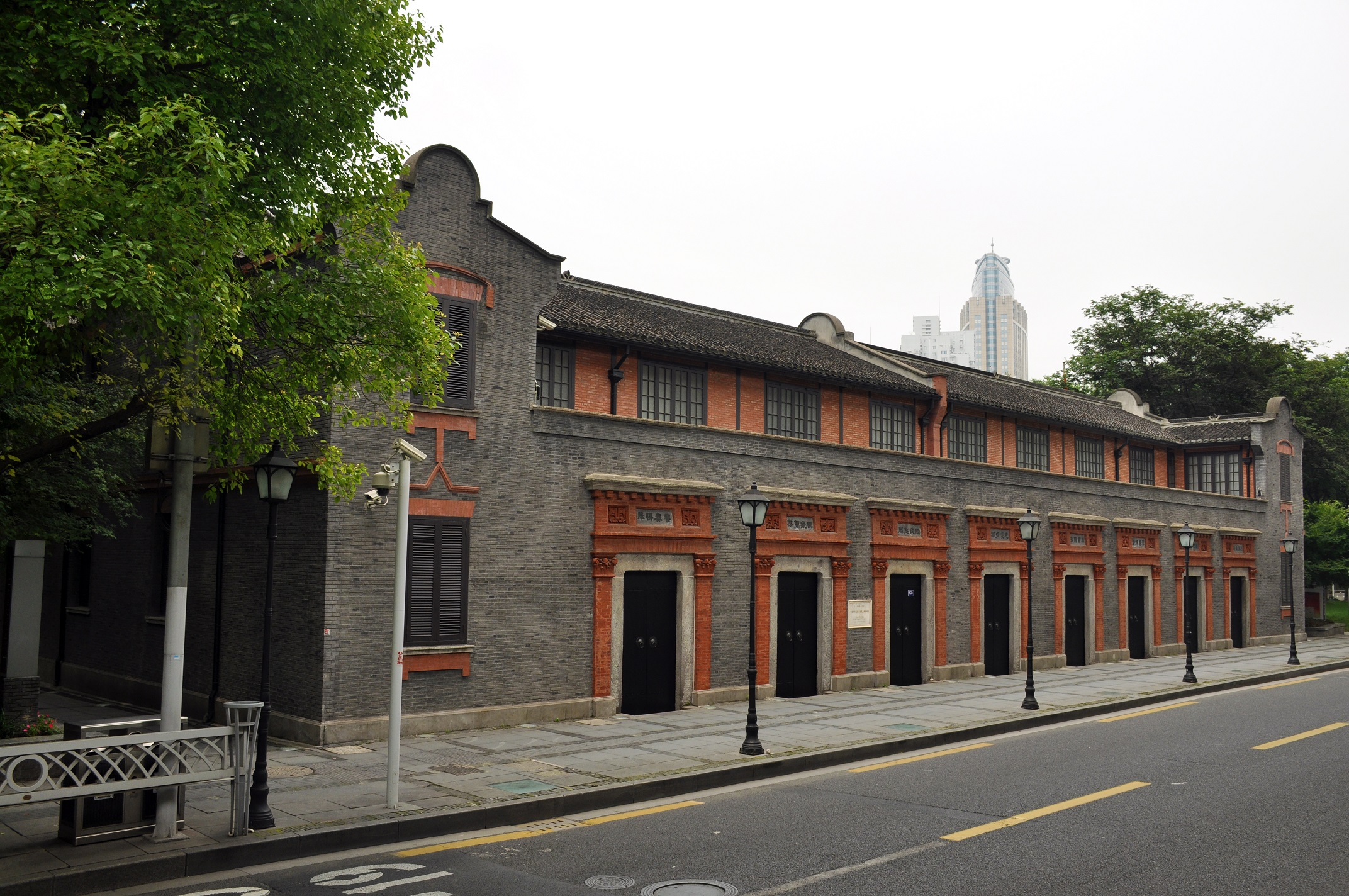 中国共产党第二次全国代表大会会址 静安区 1922年